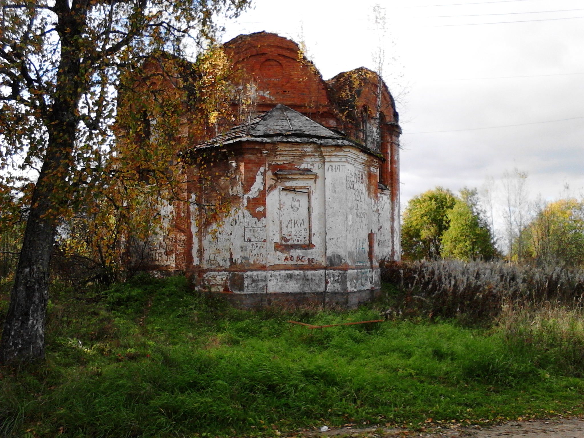 Volkhovsky District, Leningrad Oblast, Russia